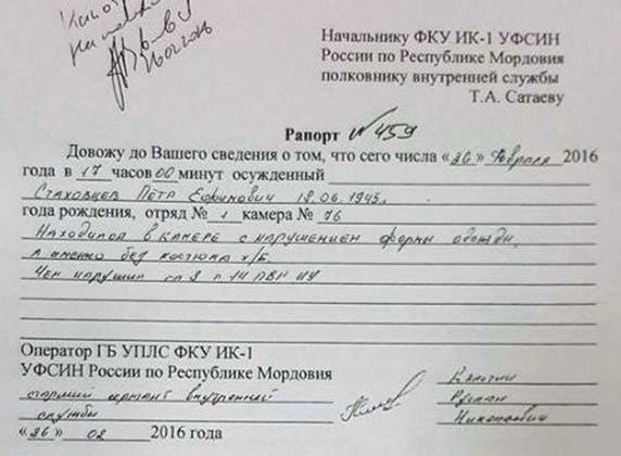 Рапорт на Петра Стаховцева в УФСИН России по Республике Мордовиии. 2016